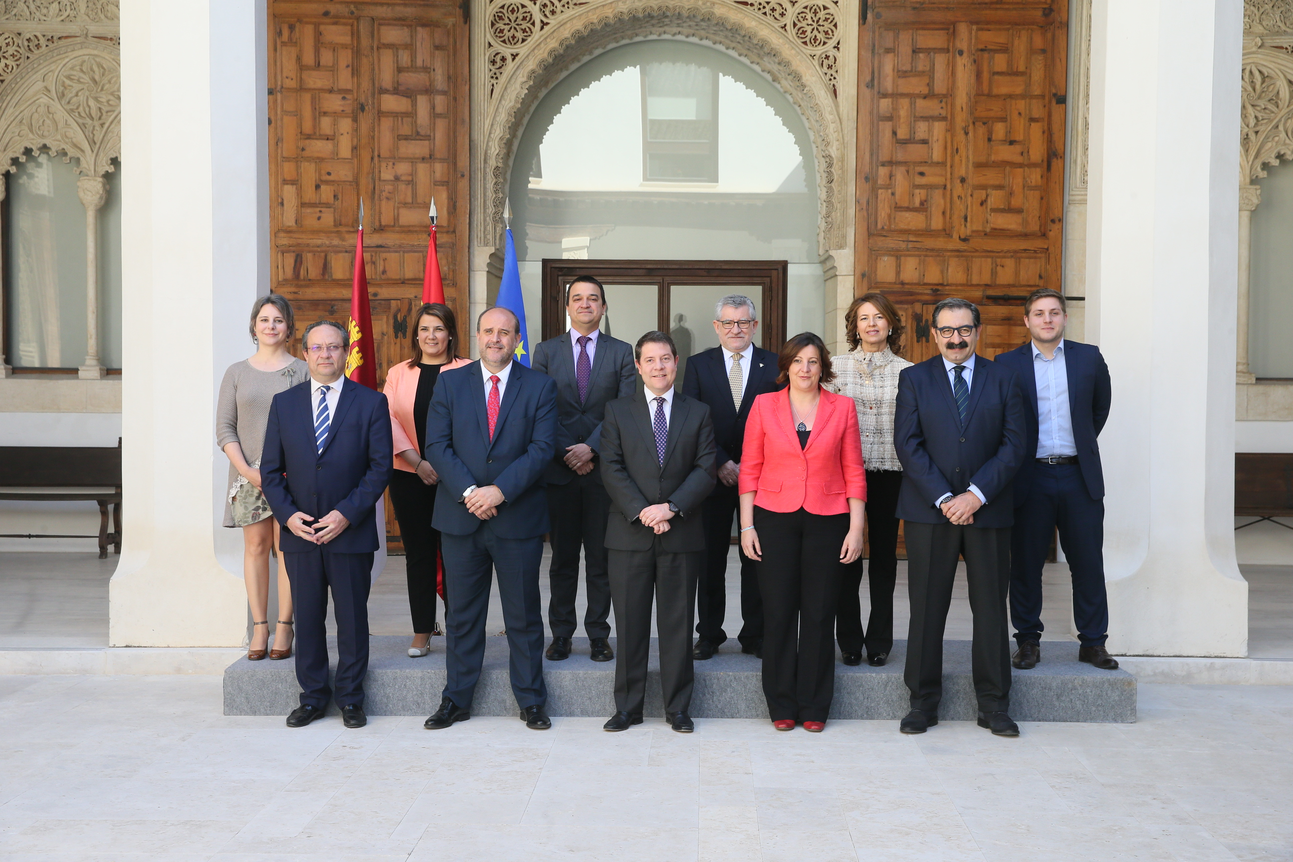 Gouvernement García-Page suite à la prise de fonction de la conseillère à l'Équipement en avril 2017.